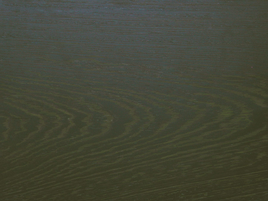 Wolfgang Wolff